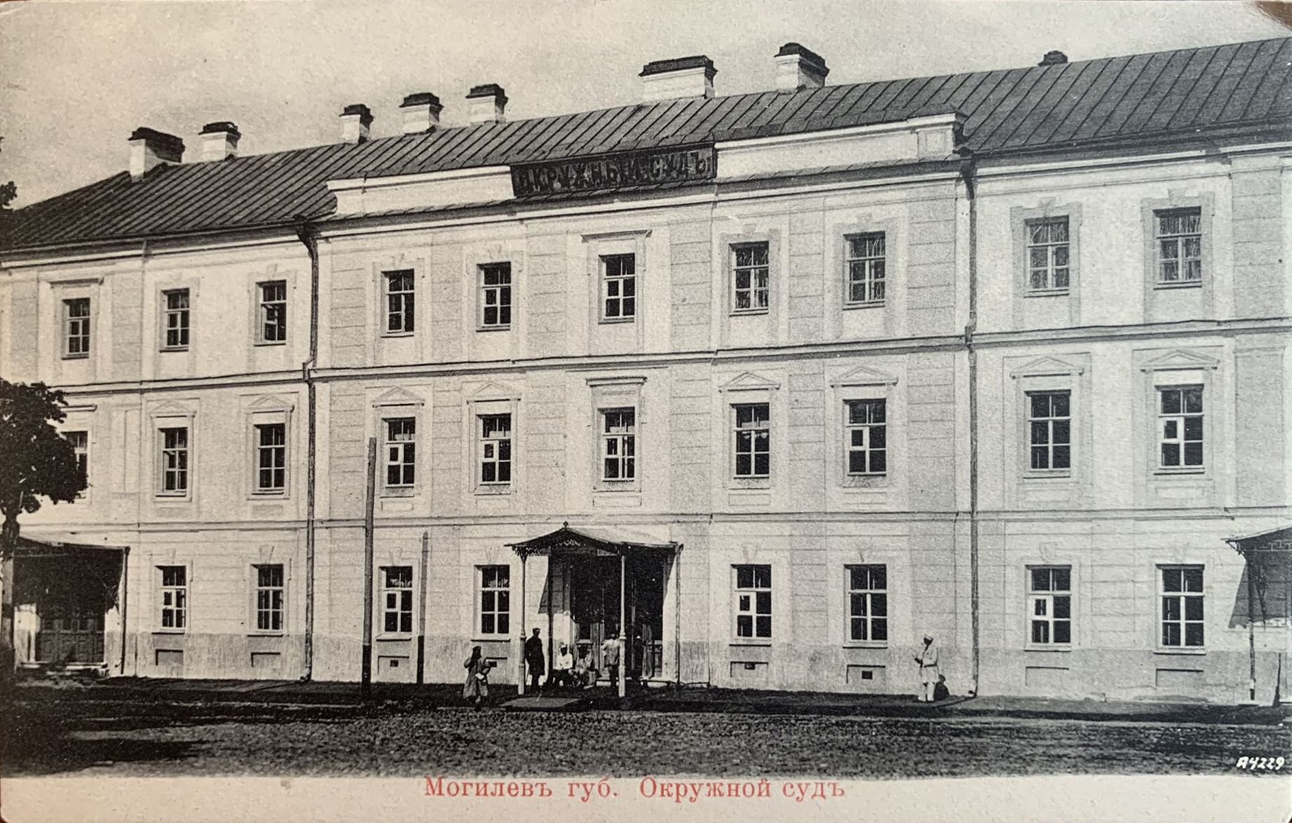 Беларуская (тарашкевіца): Магілёў (Mahiloŭ), пляц Рынак (plac Rynak). Будынак Акруговага суду